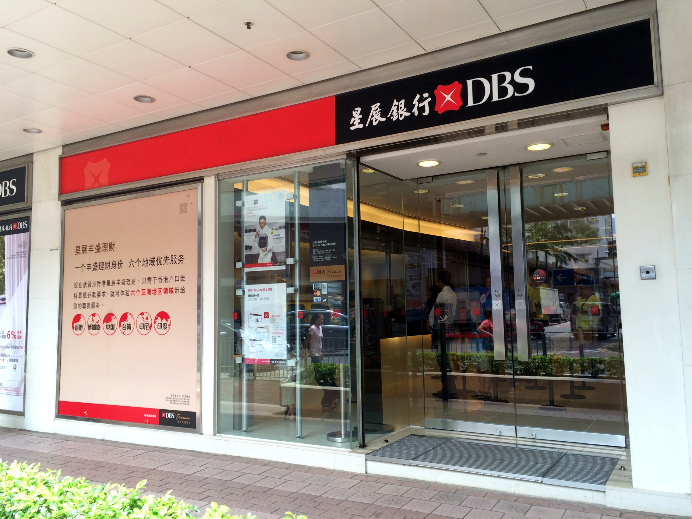 DBS Bank in Shatin Plaza